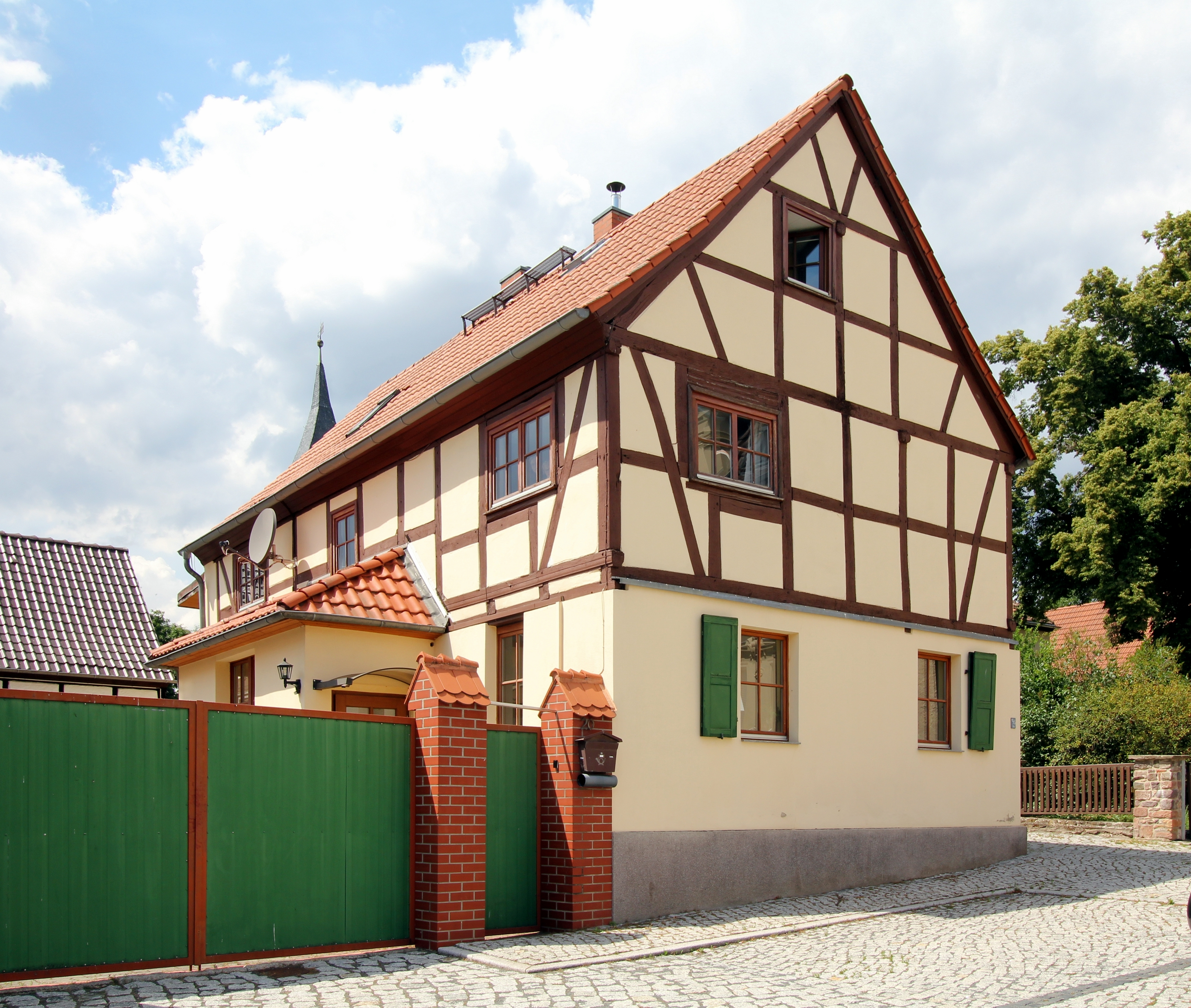 Wohnhaus Walter-Rathenau-Straße 20 in Niederndodeleben